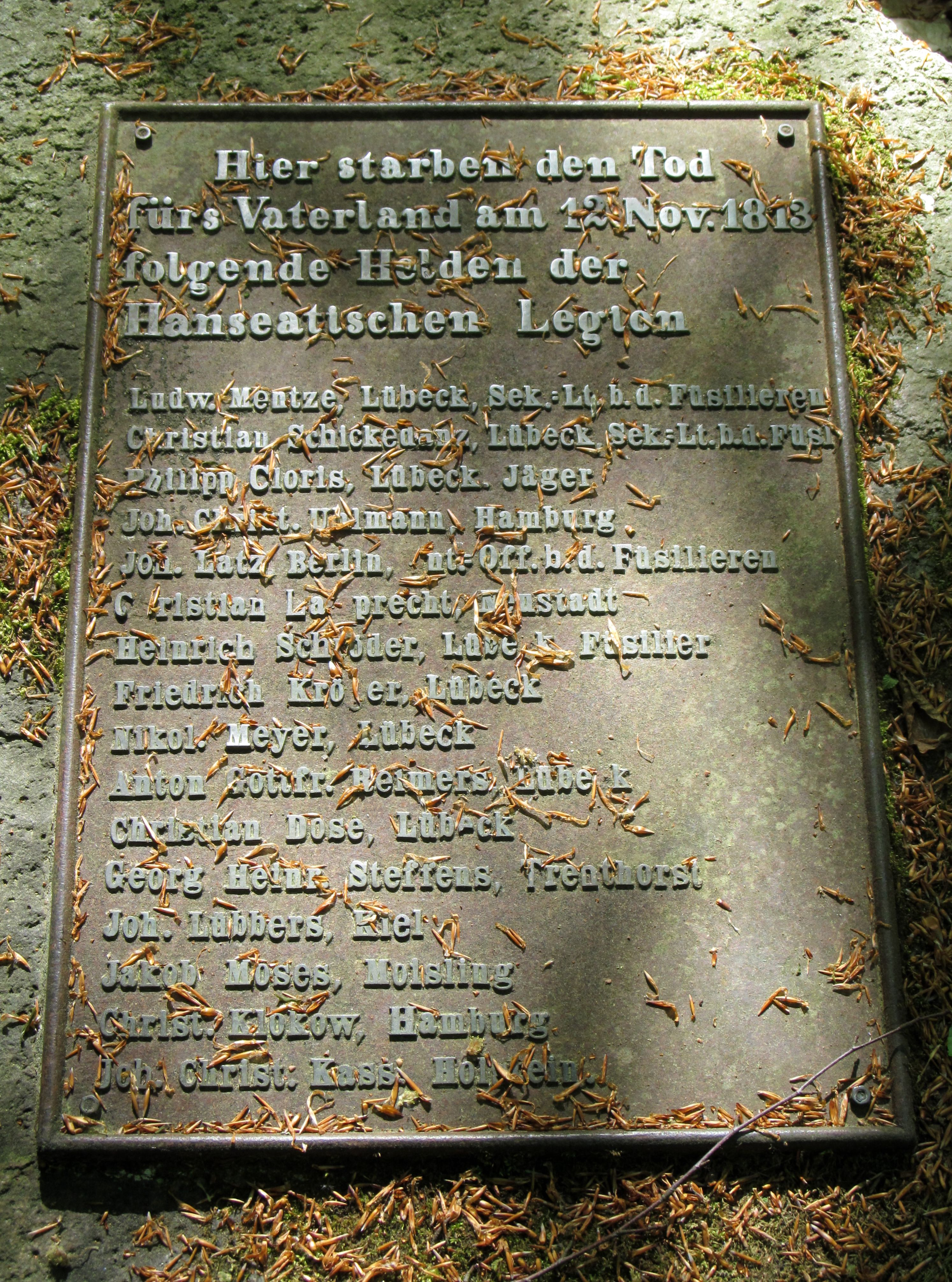 Denkmal bei Mölln zur Erinnerung an ein Gefecht der Hanseatischen Legion gegen napoleonische Truppen 1813